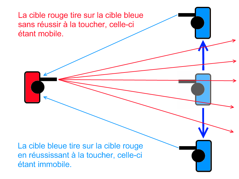 Image illustrant la technique du strafing.